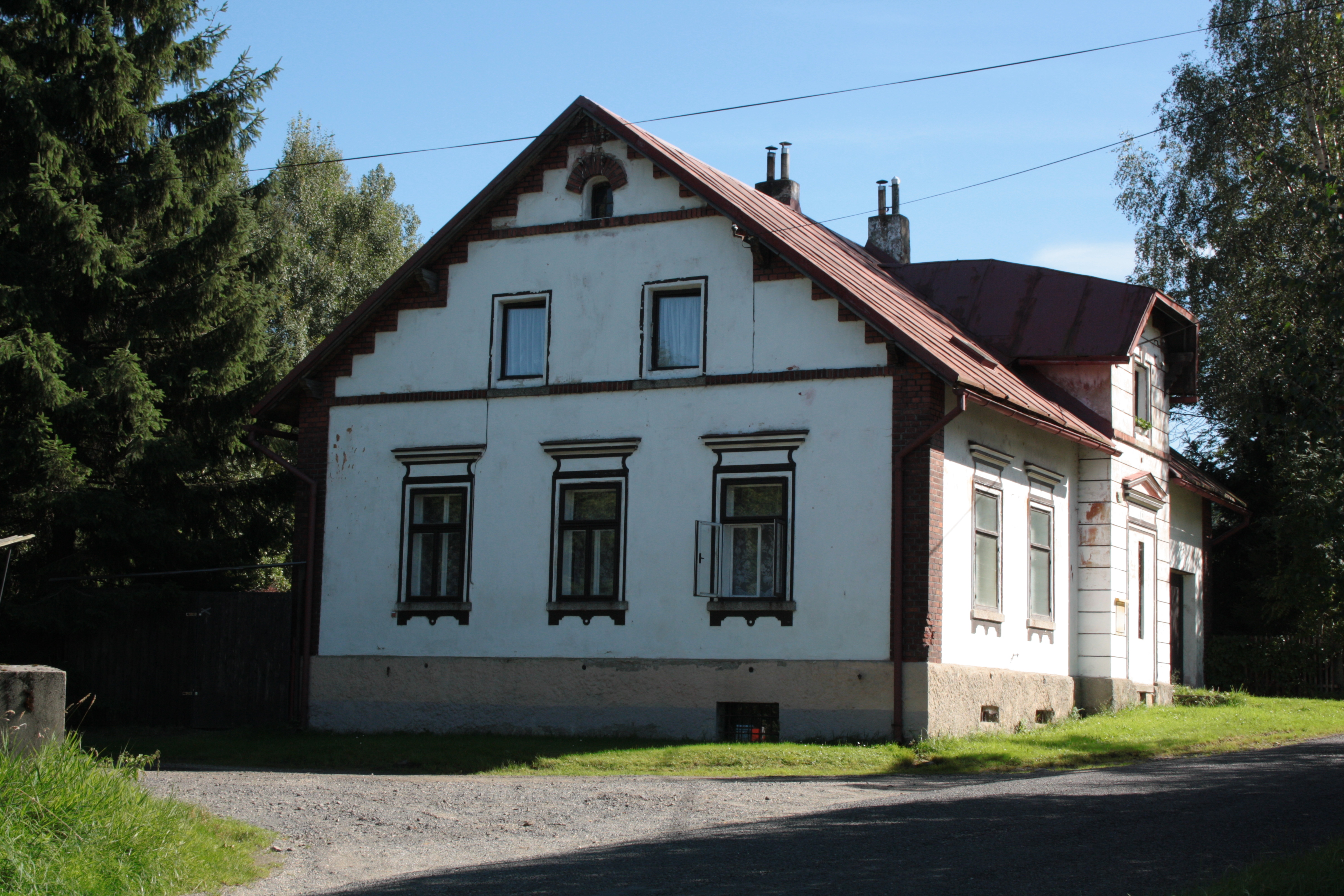 This photograph was taken with a DSLR from WMCZ's Camera grant. Dům evidenční číslo 10 v Dětřichovci, součásti Jindřichovic pod Smrkem.